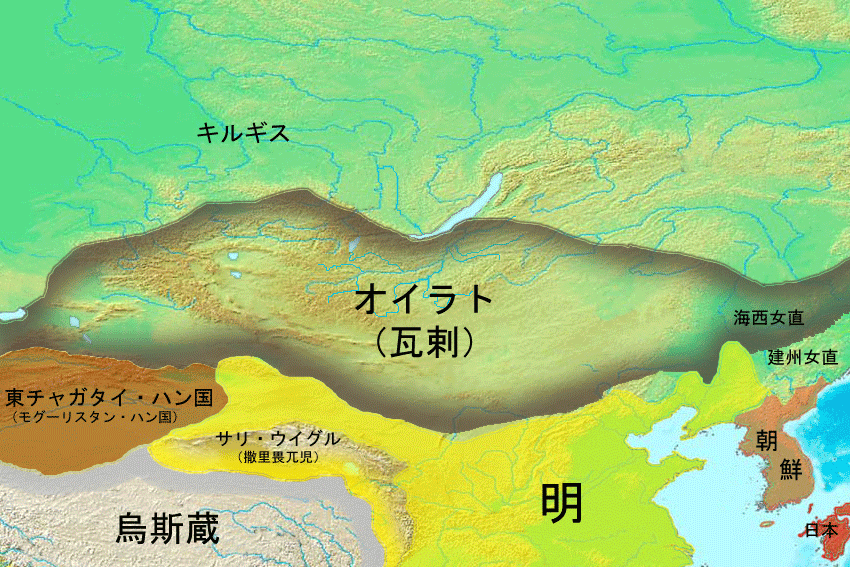 エセン・ハーン時のオイラト（1450年頃）。